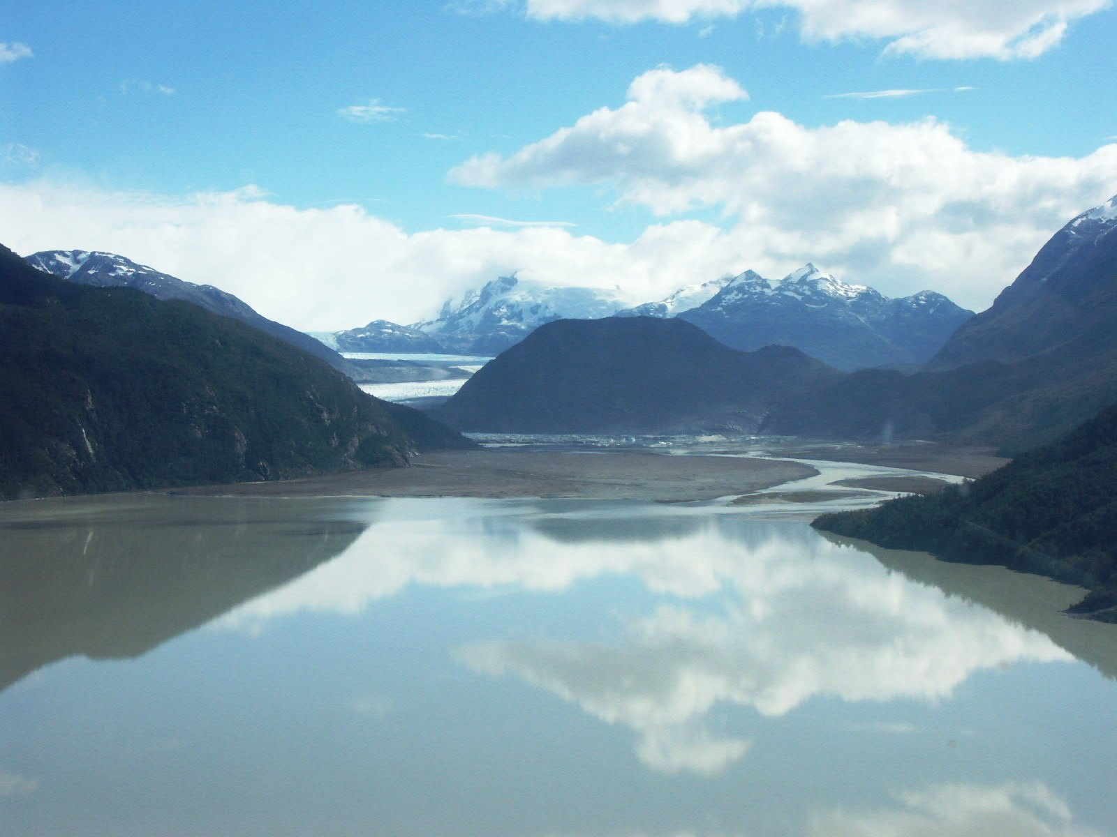 Afluente al río Baker, Aysén, Chile